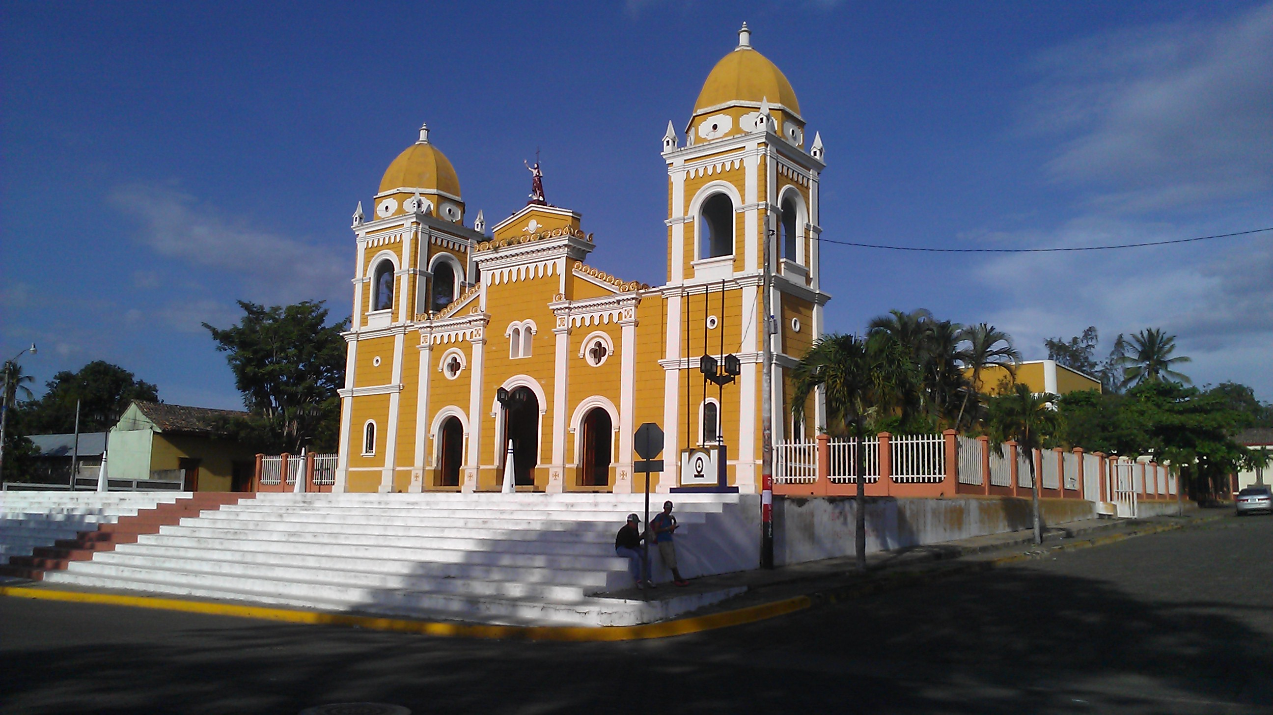 Parroquia San Juan Bautista de Masatepe